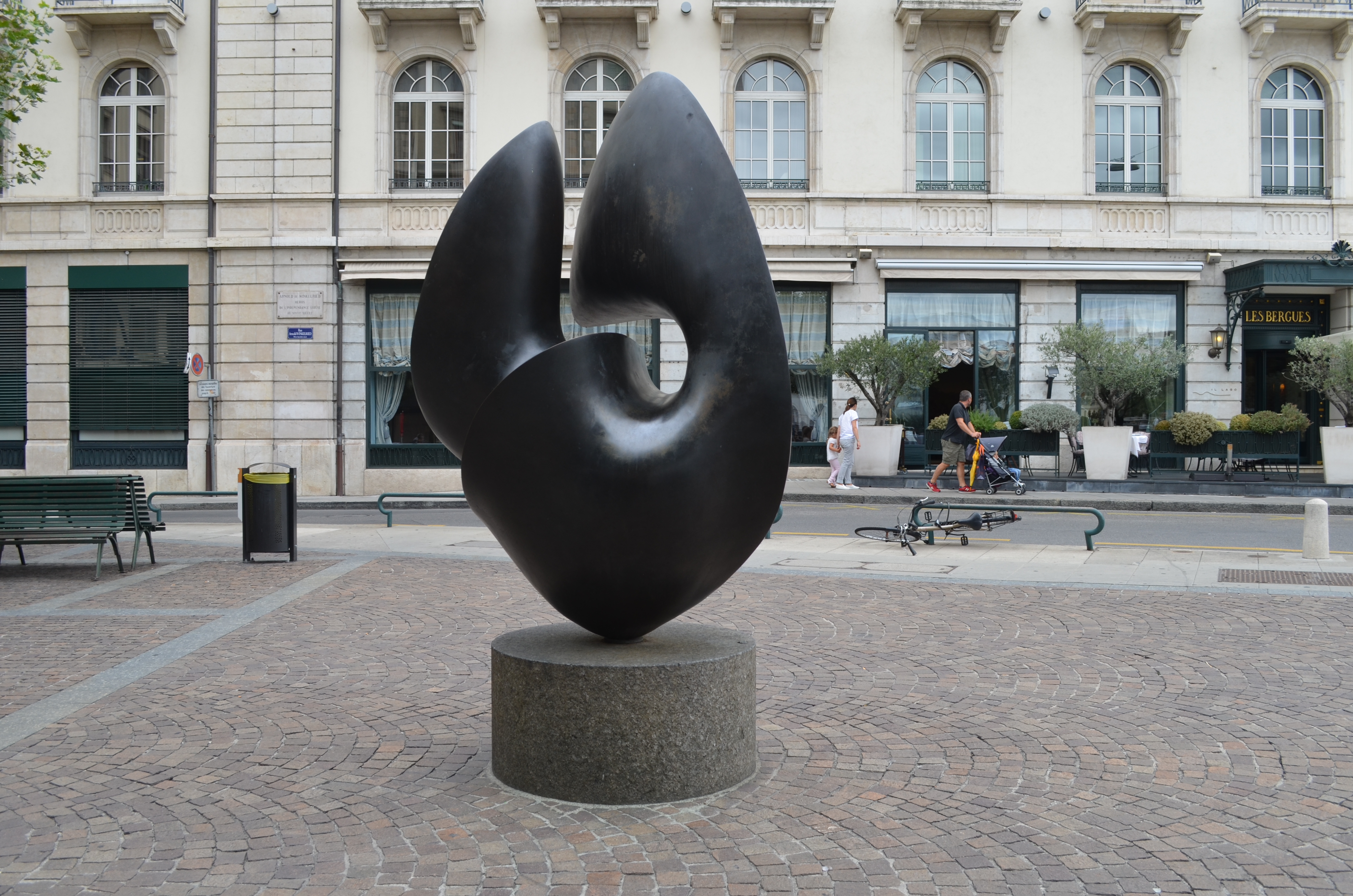 Sculpture La flamboyante de l'artiste Antoine Poncet, Place des Bergues, Genève, Festicabales 2015. The making of this document was supported by Wikimedia CH. (Submit your project!) For all the files concerned, please see the category Supported by Wikimedia CH.